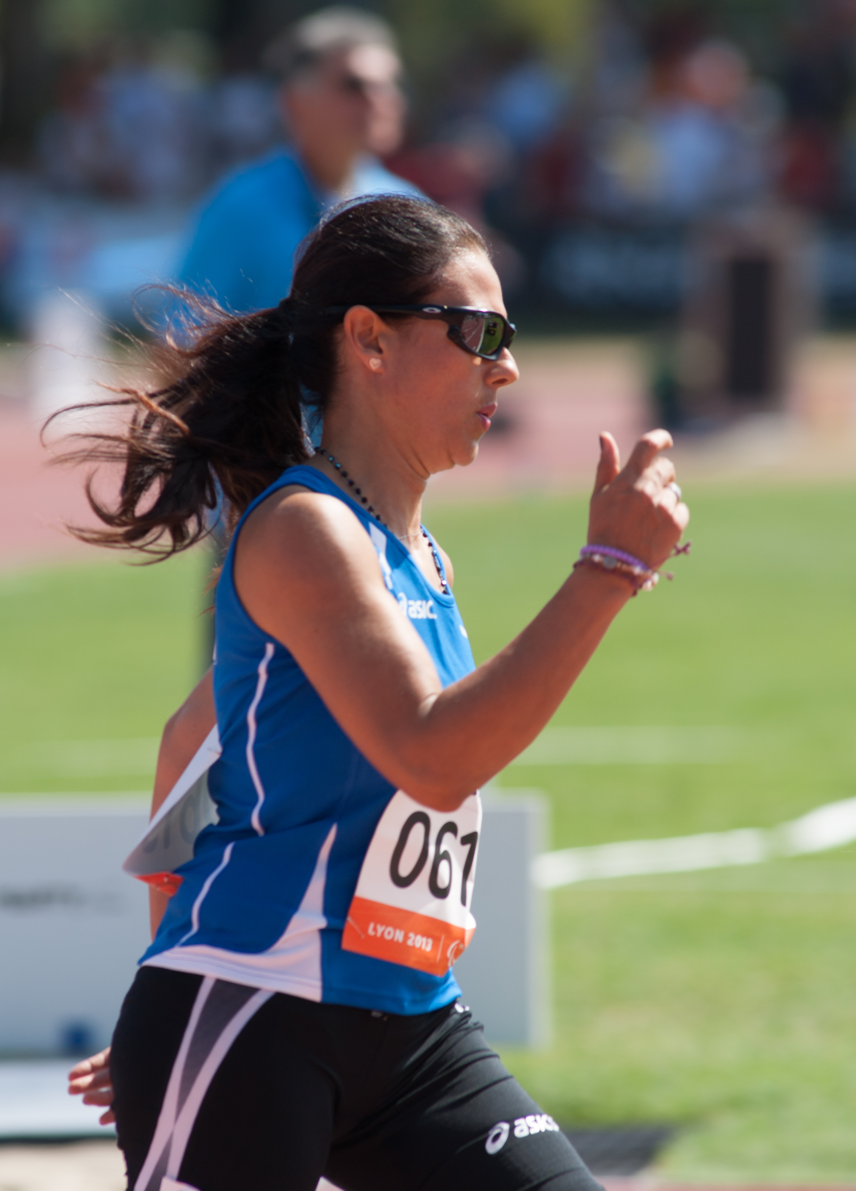 Championnats du monde d'athlétisme IPC 2013.